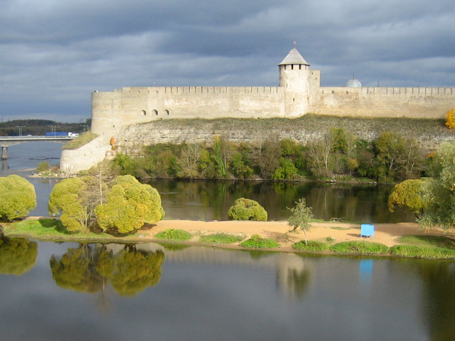 Inhalt: Die Festung Iwangorod an der Grenze zwischen Russland und Estland.